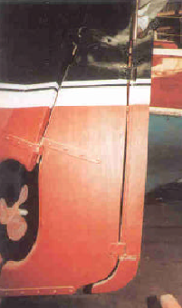 banderuola verticale